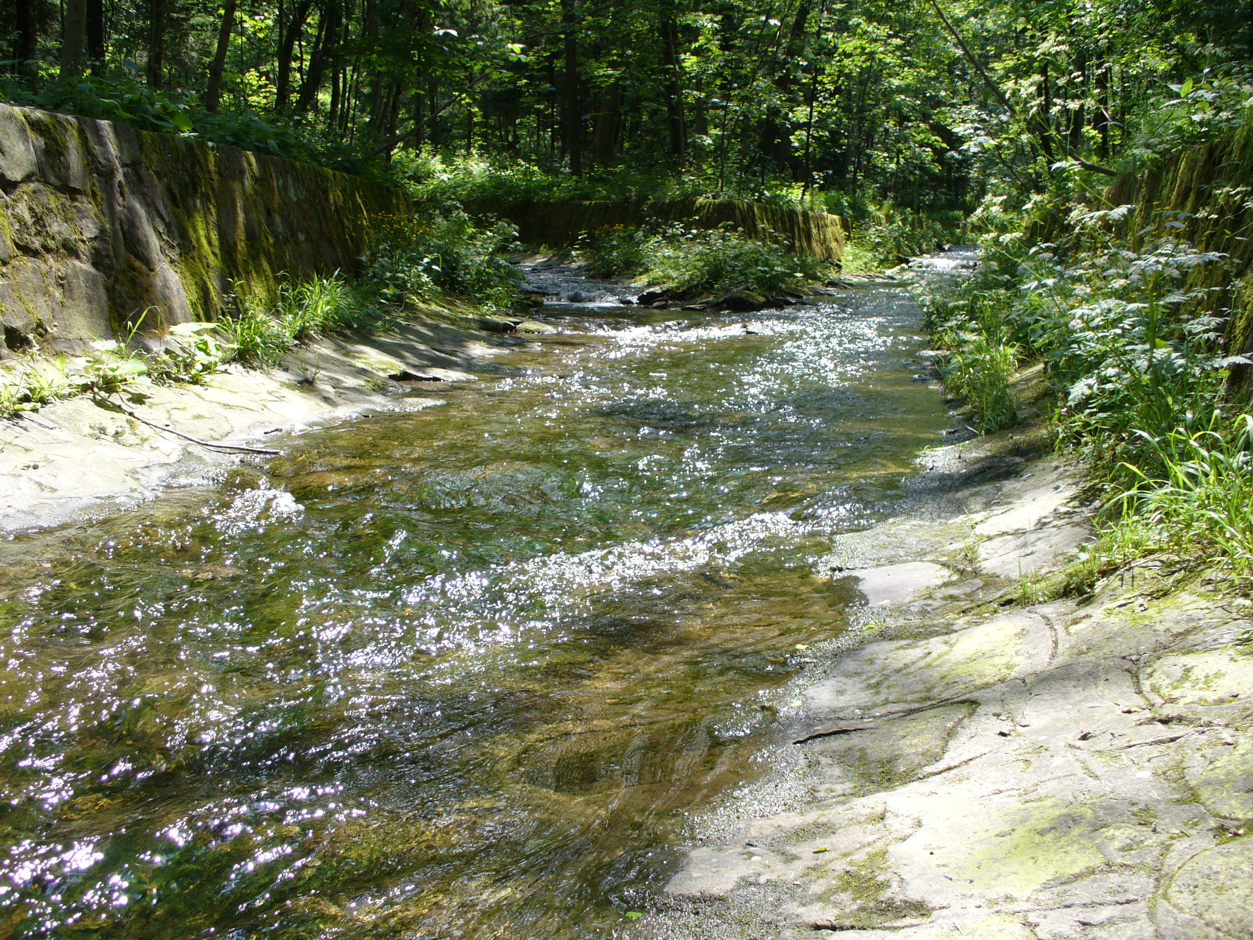 Złoty Potok wpada do rzeki Wapienica.